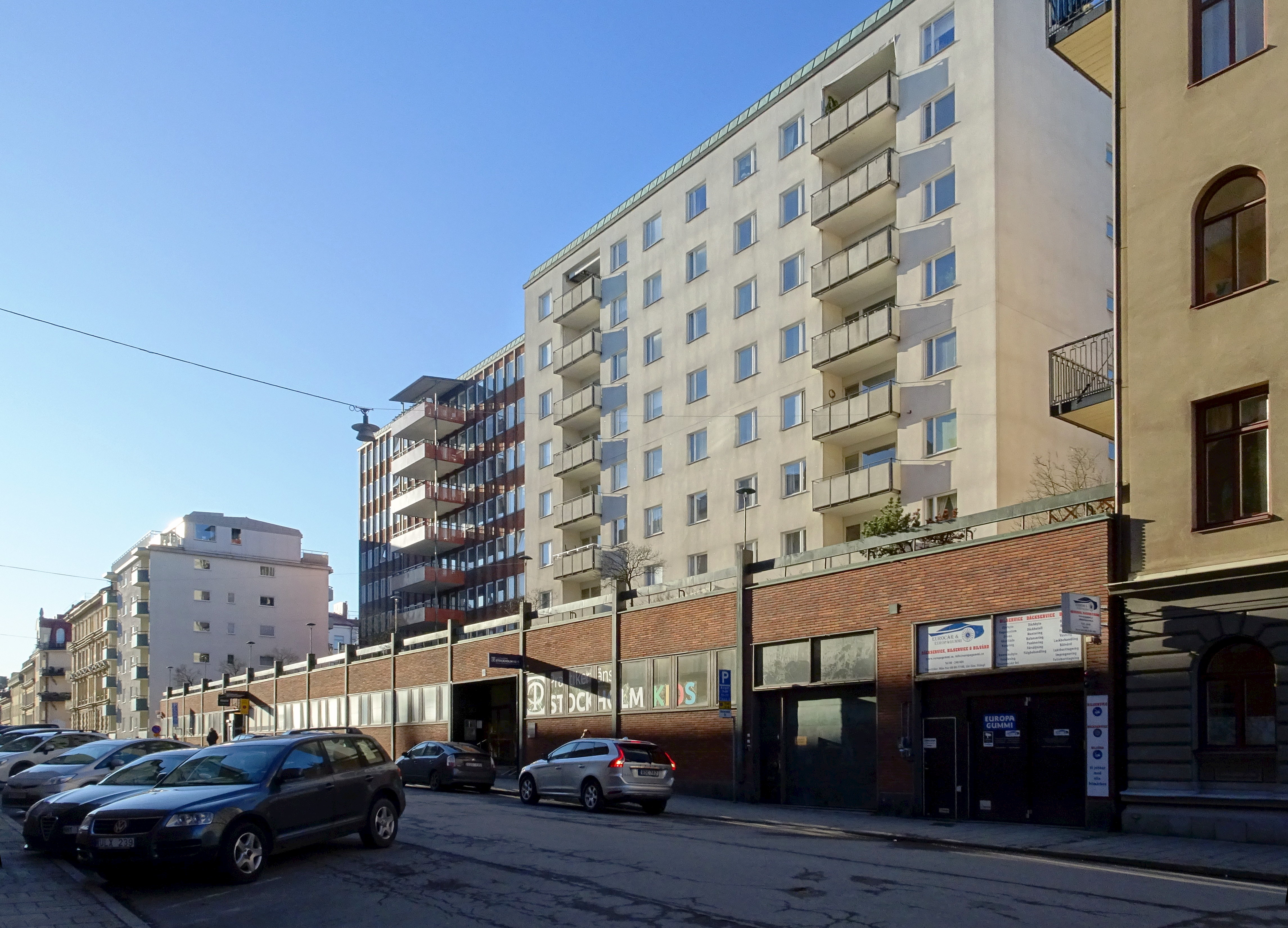 Älgen 24, Brahegatan 45-49, Ernst Grönwall (Arkitekt), Svenska Entrepenad AB Sentab (Byggherre), Svenska Entrepenad AB Sentab (Byggmästare). Nybyggnadsår 1962 - 1965